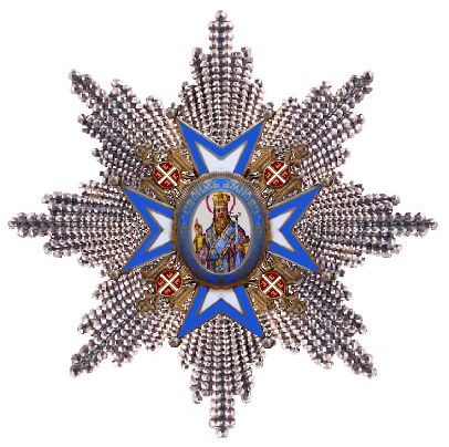 Ster van een Grootkruis in de Orde van Sint-Sava